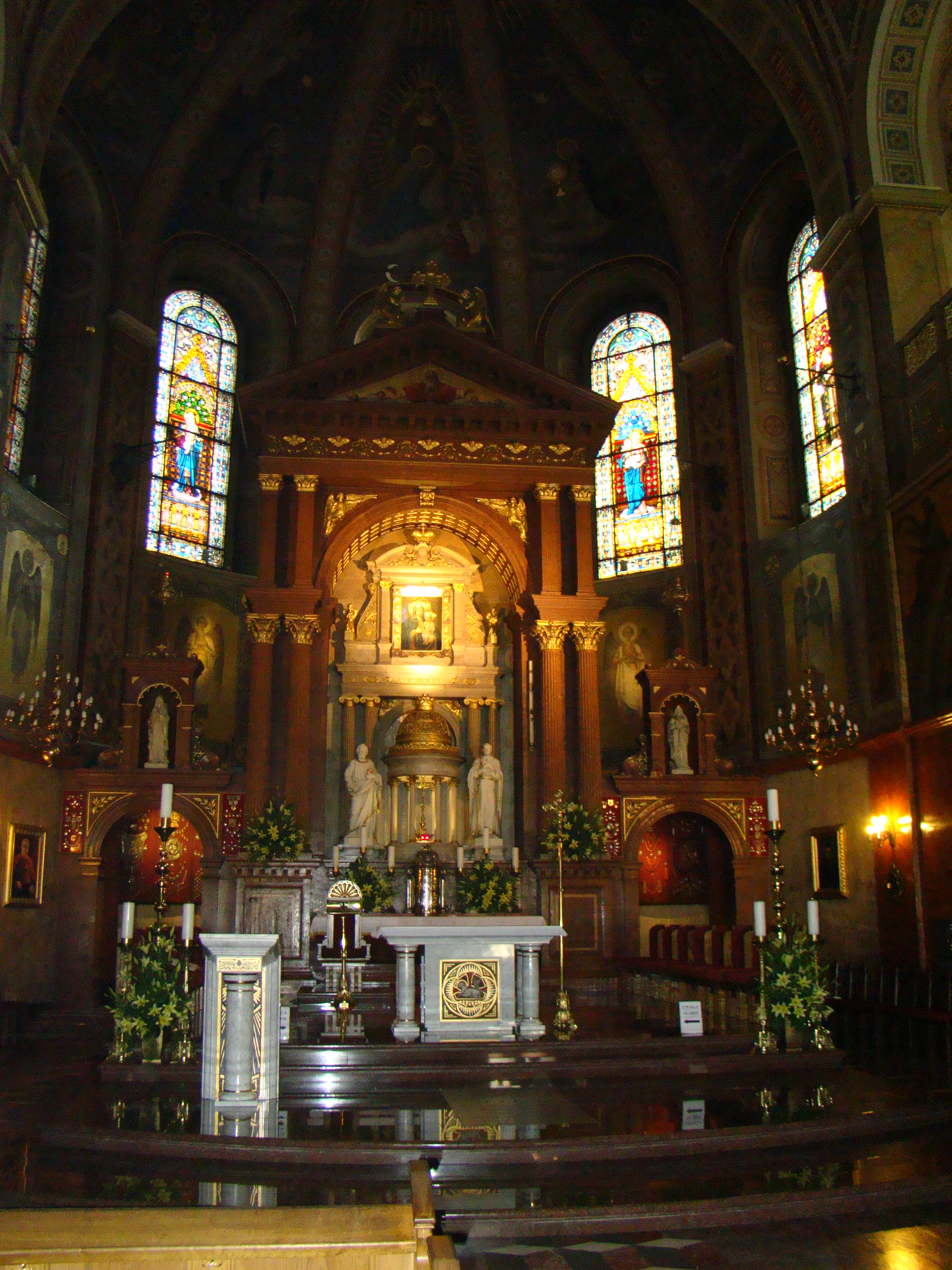 Piekary Śląskie, Bazylika Najświętszej Marii Panny i św. Bartłomieja, 1842-1849